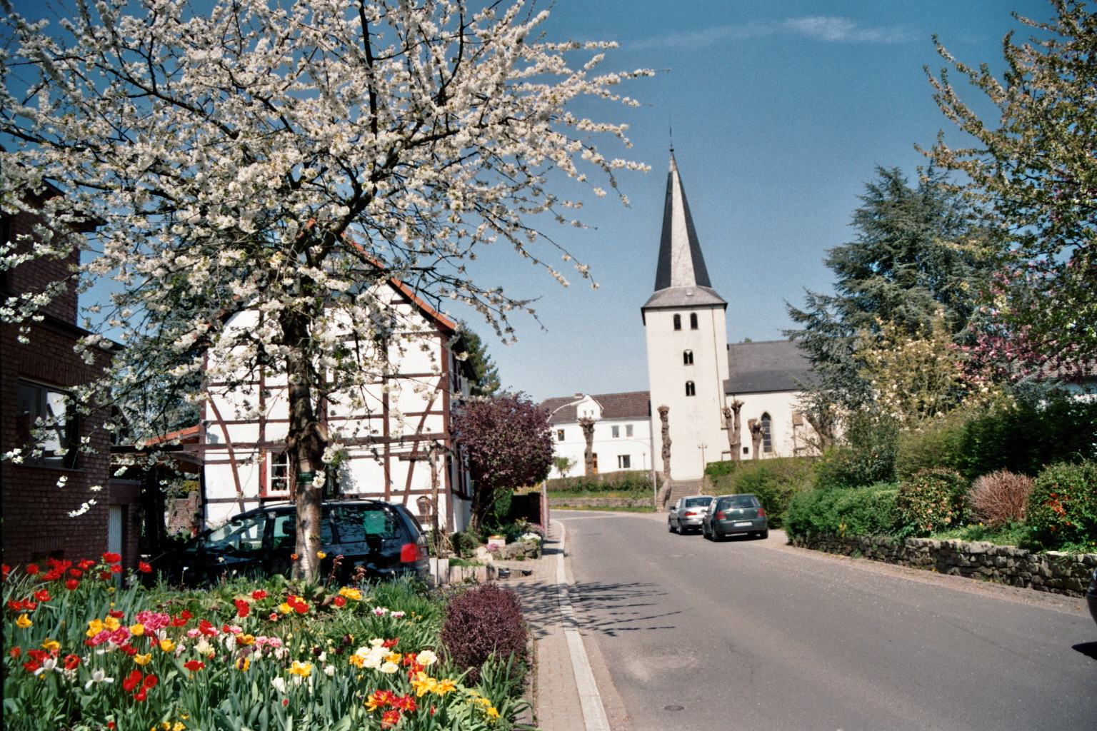 Evangelische Kirche in Unna-Lünern, Nordrhein-Westfalen, Deutschland.